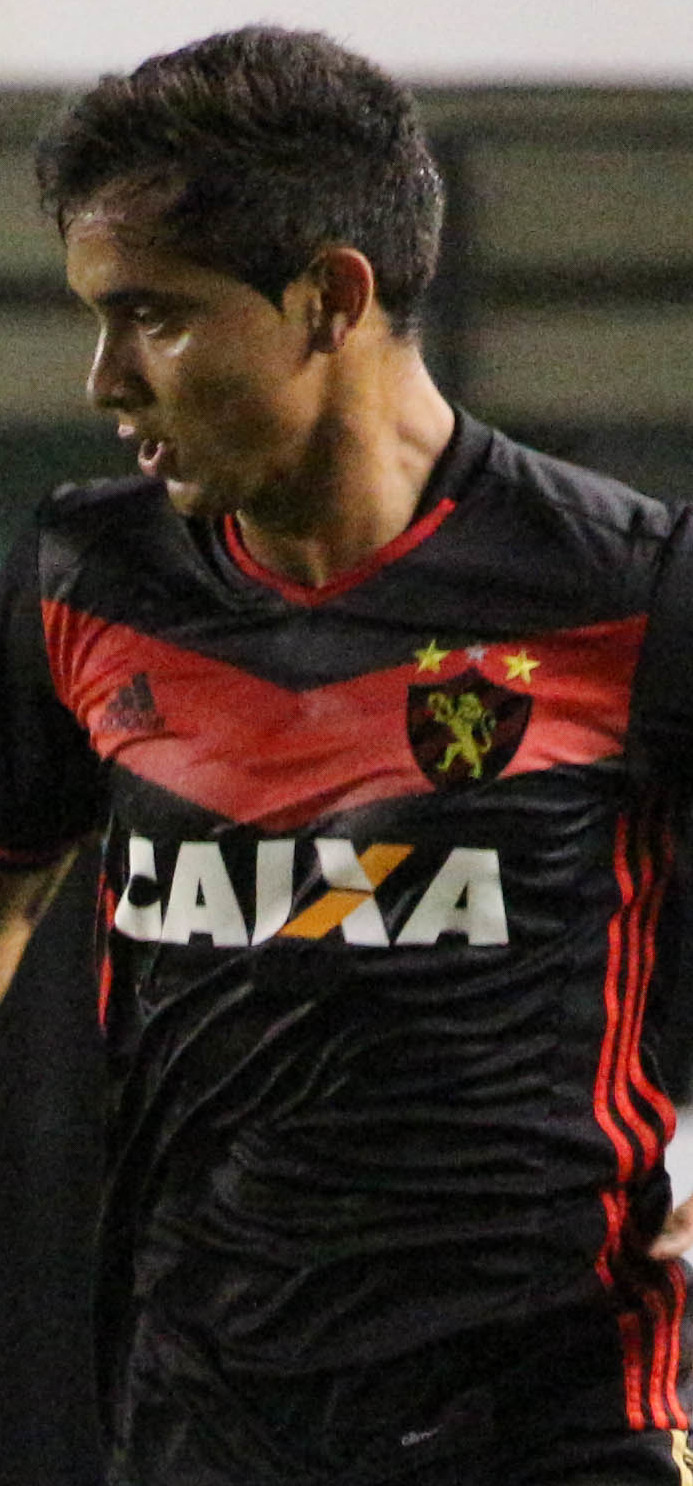 Foto: Douglas Teixeira/Futebol Santista